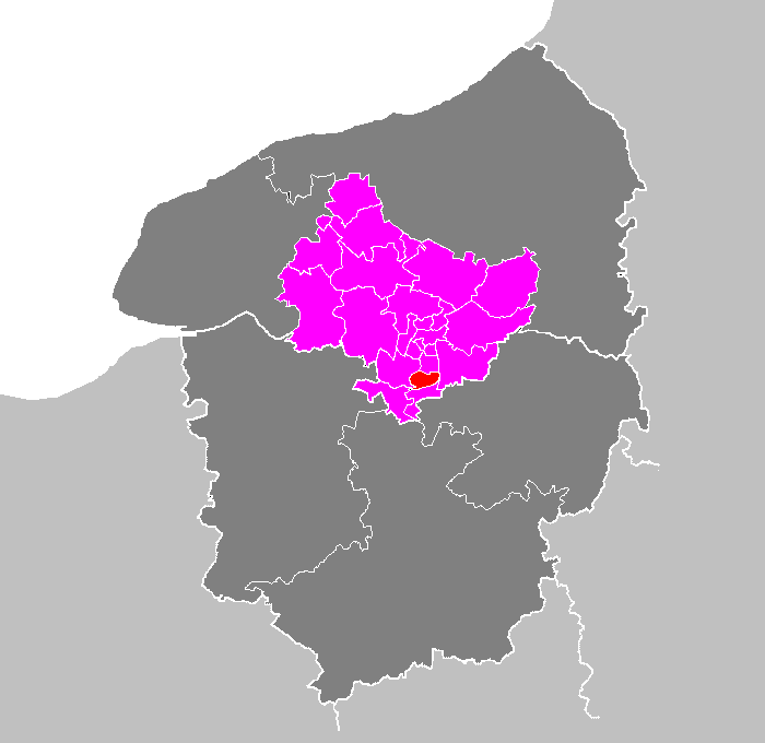 Maps of arrondissements and cantons of France: Arrondissement de Rouen - Canton de Saint-Étienne-du-Rouvray.PNG